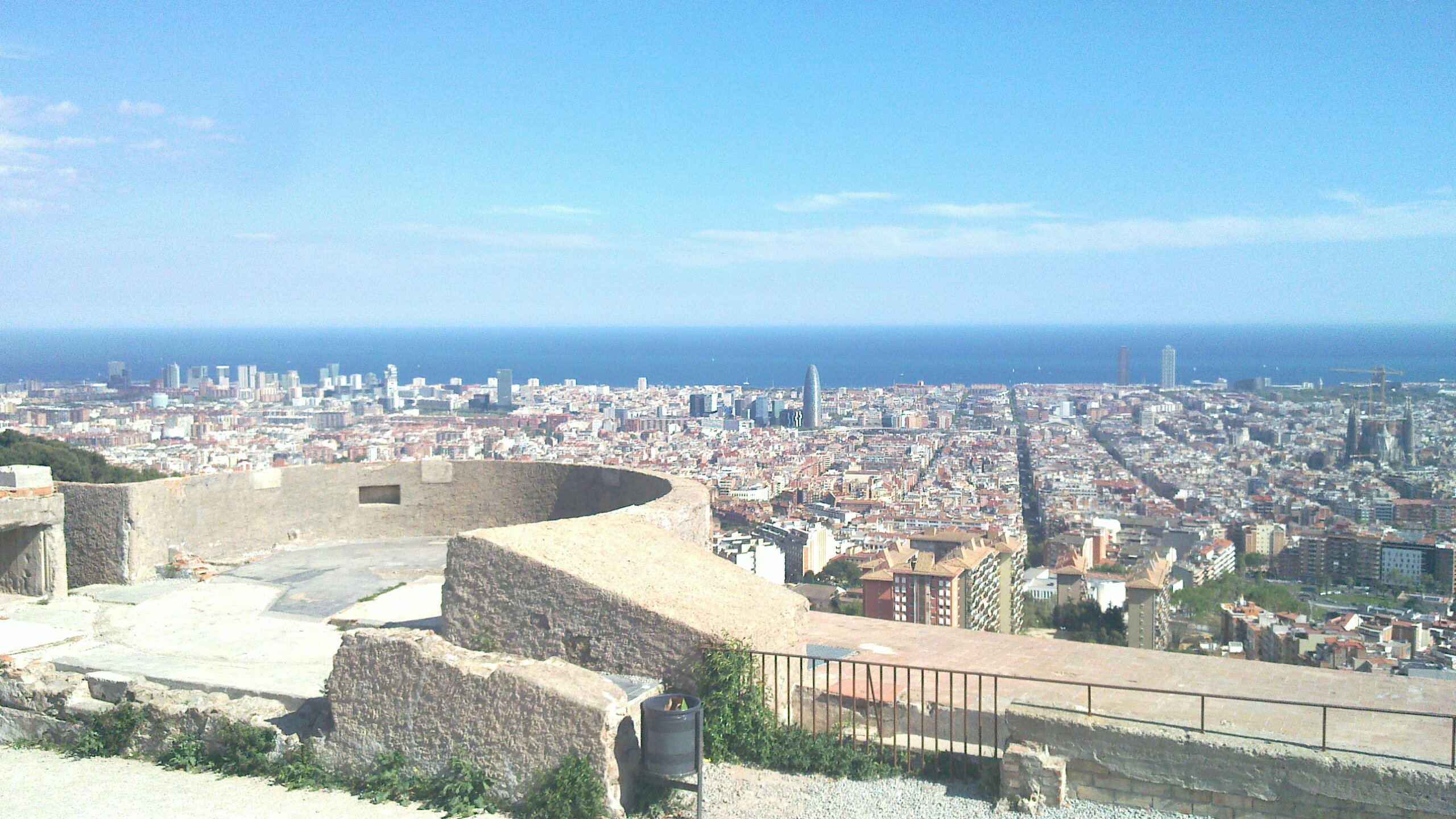 Vista de Barcelona des del Turó de la Rovira - El cim del Turó de la Rovira està coronat per una plataforma d'antiaeris que formaven part de la defensa activa de la ciutat durant la guerra civil.